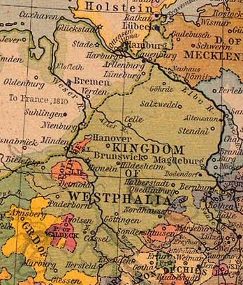 Koninkrijk Westfalen